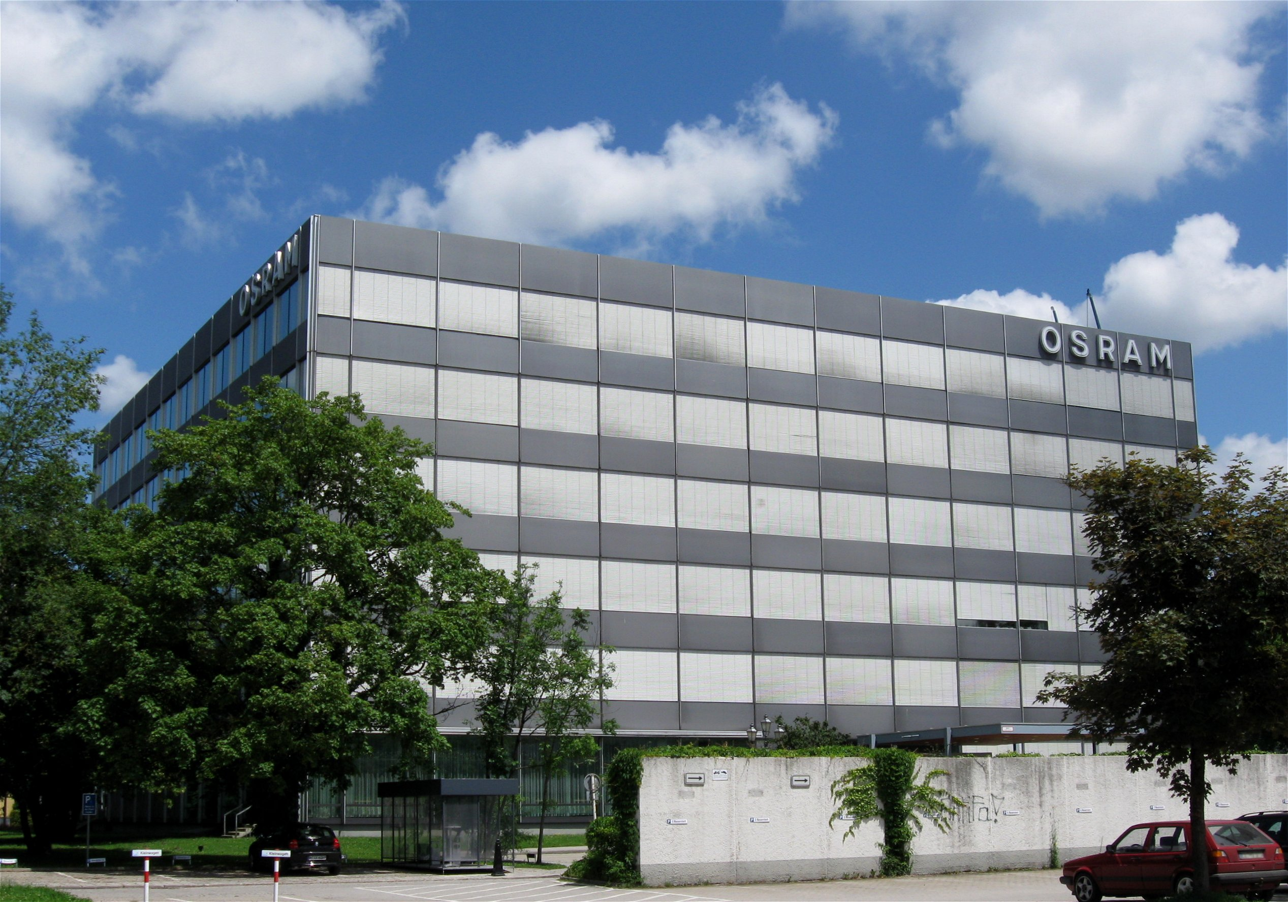 Hellabrunner Straße 1; Verwaltungsgebäude der Osram GmbH, kubischer, sechsgeschossiger Stahlskelettbau über quadratischem Grundriss, mit zwei Verkehrs- und Installationskernen aus Ortbeton; Aluminium-Glas-Vorhangfassade von äußerster Schlichtheit und Rationalität; Großraumbüros mit Vollklimatisierung; Eingangs-Vordach auf Stützen; 1963-65 von Walter Henn unter Mitarbeit von Dieter Ströbel als in Deutschland frühes Beispiel eines Großraum-Verwaltungsbaus errichtet; Foyer mit Glasprismenwand von A. F. Gangkofner und Holzintarsienwand von F. Stelzig.